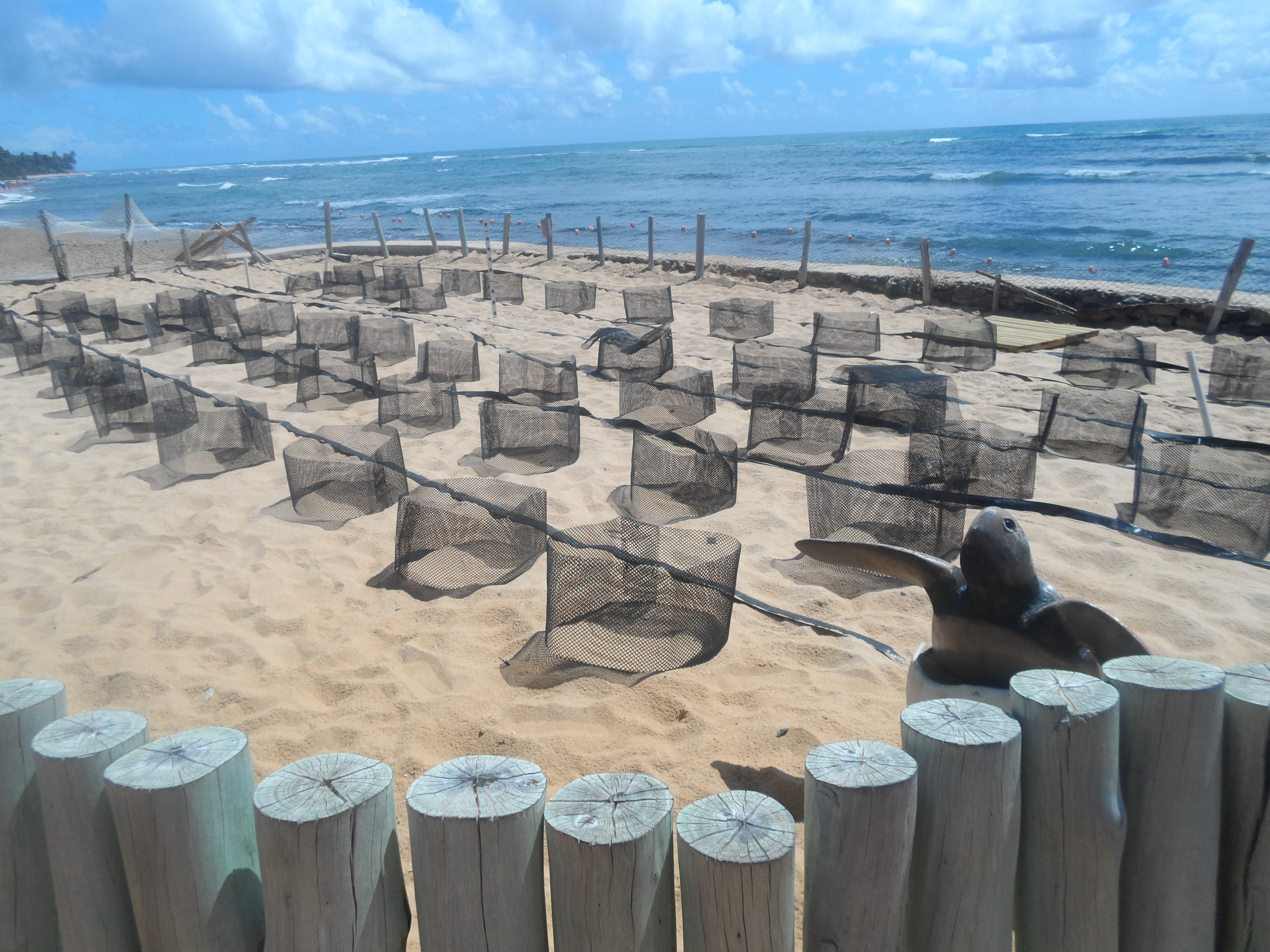 Preservação